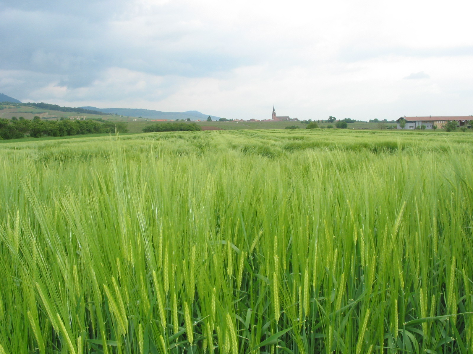 Gerste